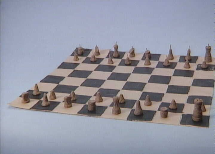 Skakspil og skakbrikker fremstillet af rugbrød i Århus Arrest